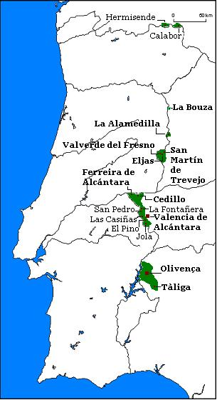 Els municipis lusòfons de la ratlla fronterera entre Espanya i Portugal.